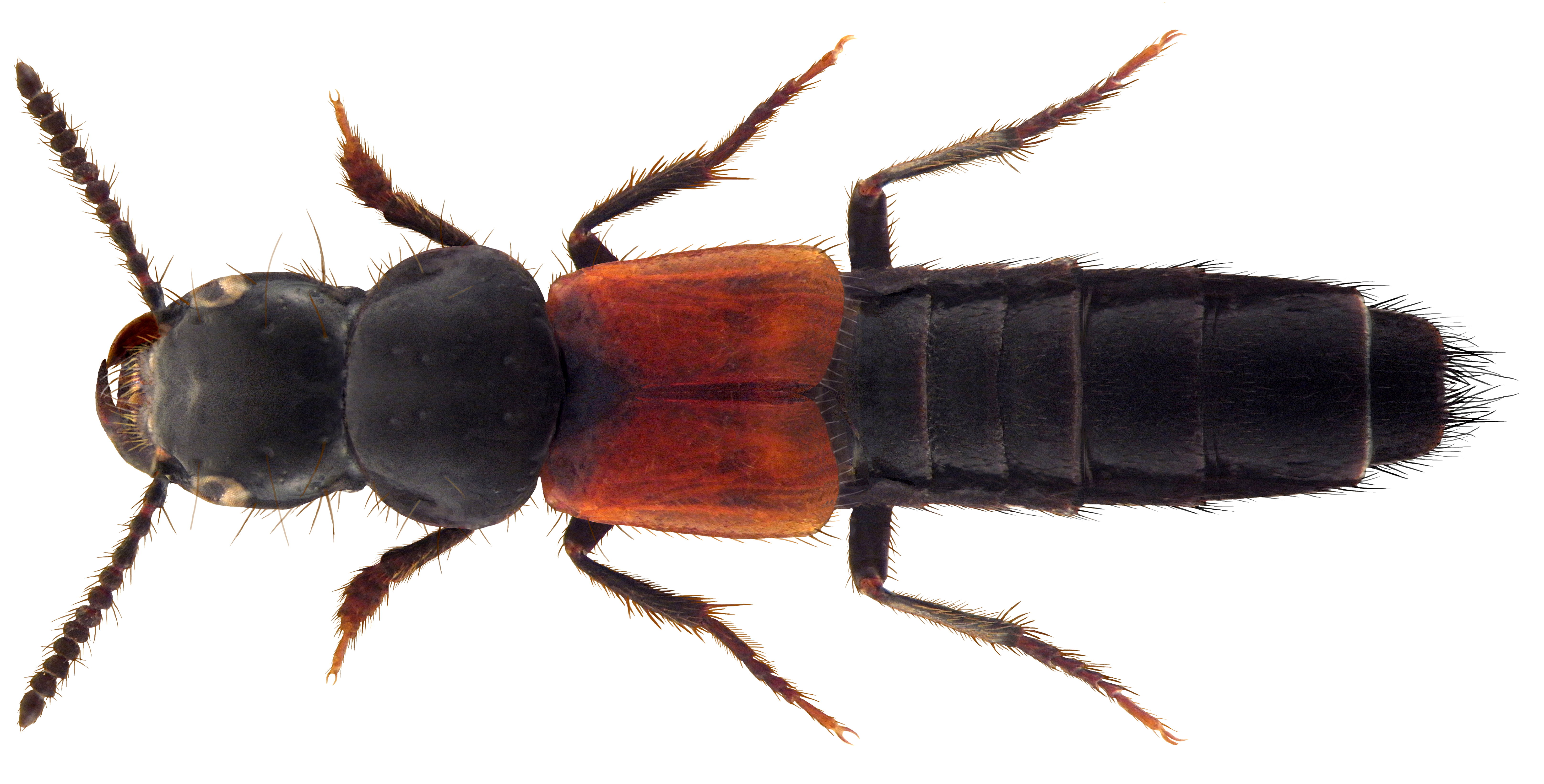 Familie: Staphylinidae Groesse: 8-11 mm Verbreitung: Europa Ökologie: lebt in unterirdischen Nestern von Säugetieren und Hautflüglern Fundort: Germania, Bayern, Oberfranken, Selbitz leg. det. U.Schmidt, 2006 Photo: U.Schmidt, 2010